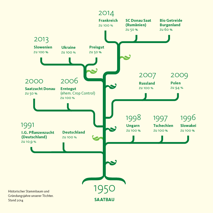 Historischer Stammbaum und Gründungsjahre der Töchterunternehmen.